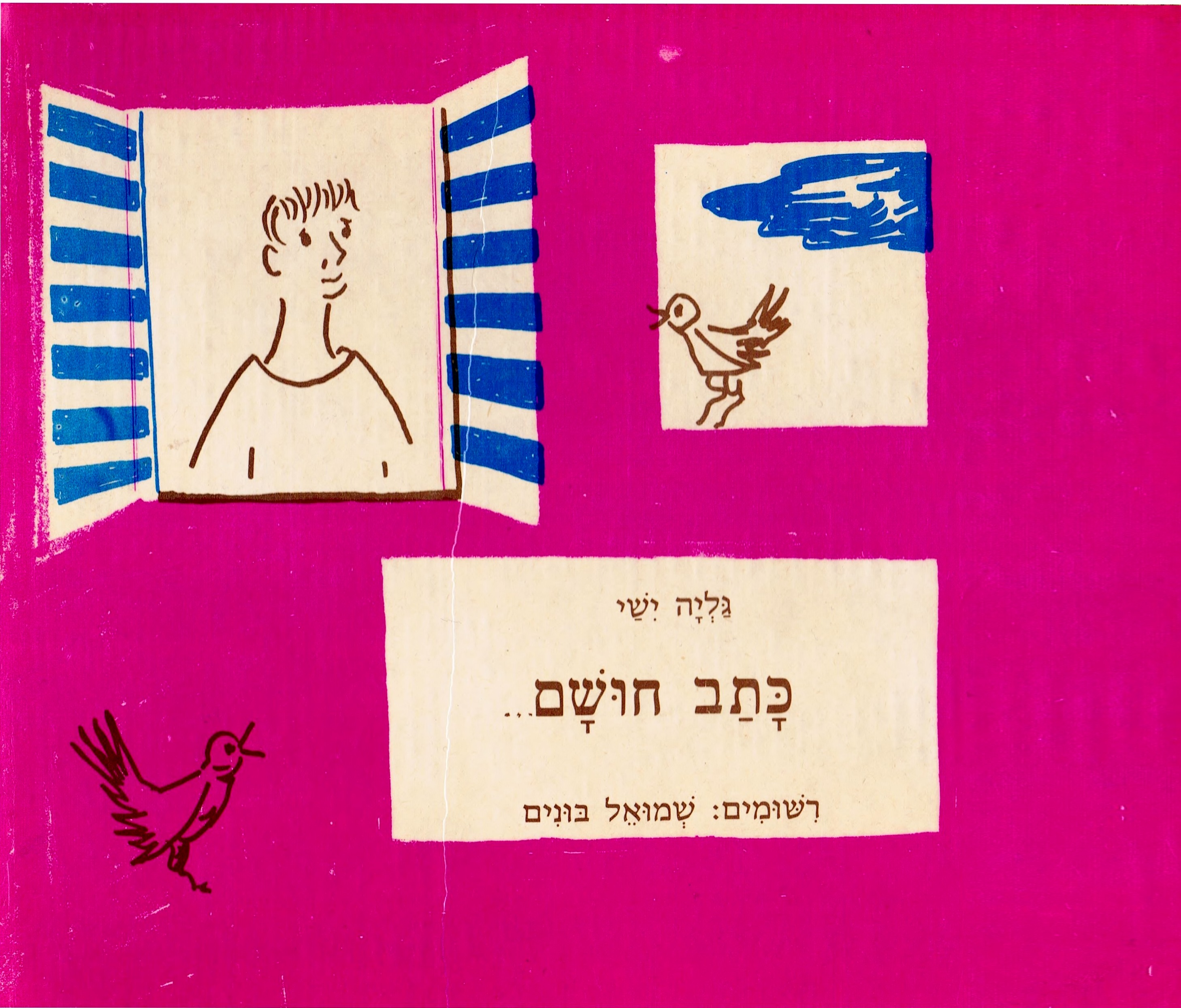 עטיפת הספר כתב חושם